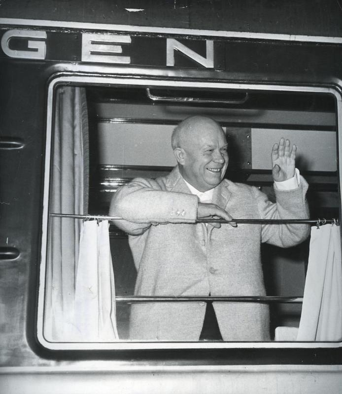 Kunowice, Nikita Chruschtschow am Zugfenster Polen: Nikita Chruschtschow auf der Durchreise. Der Erste Sekretär des ZK der KPdSU, Ministerpräsident Nikita Chruschtschow, winkt polnischen Bürgern auf dem polnischen Grenzbahnhof Kunowice zu, den er auf seiner Rückreise vom VI. Parteitag des SED in Berlin passierte. Abgebildete Personen: Chruschtschow, Nikita S.: Ministerpräsident, erster Sekretär der KP, Sowjetunion (GND 118638378)